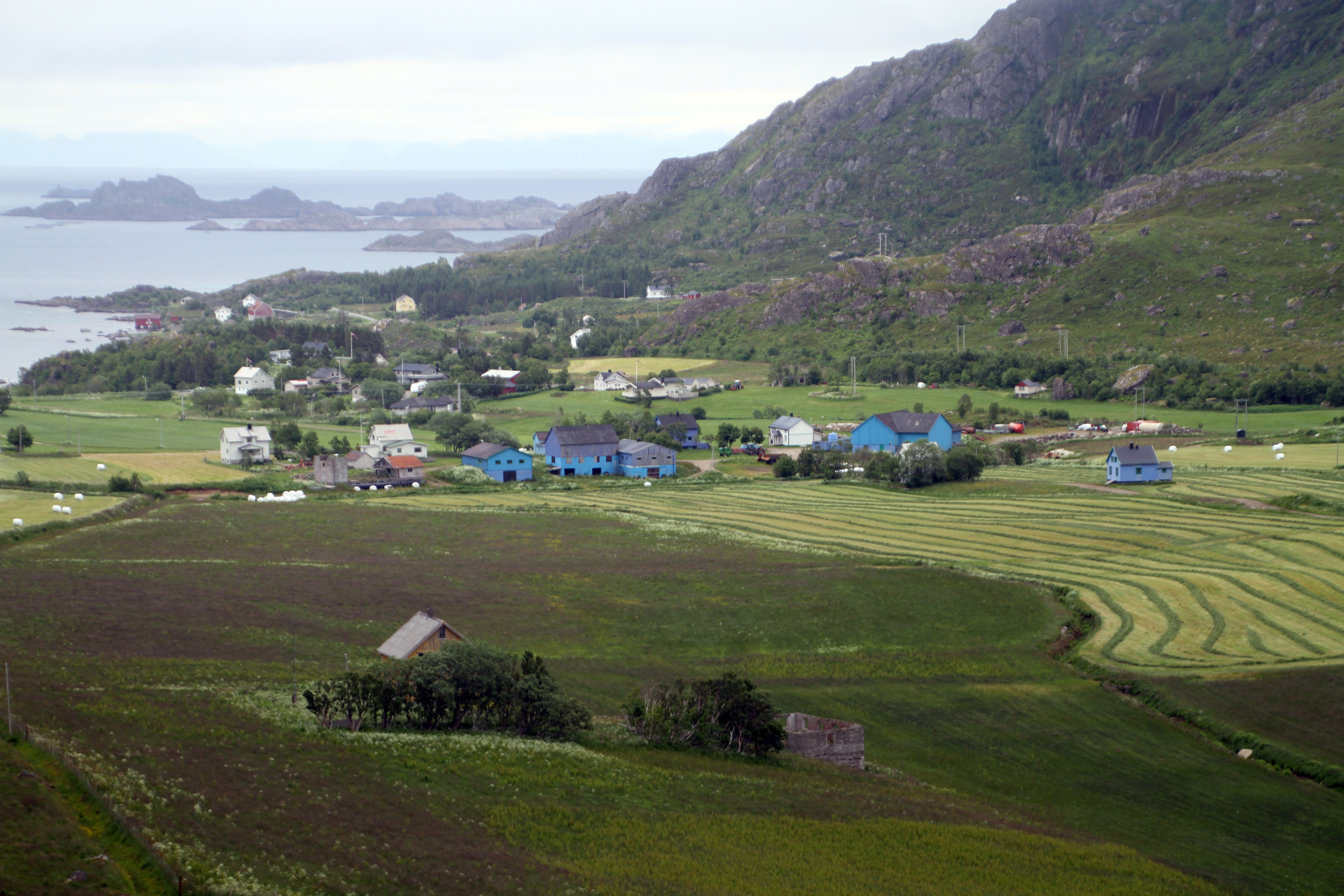 Sennesvik auf Vestvågøy (Lofoten, Norwegen)